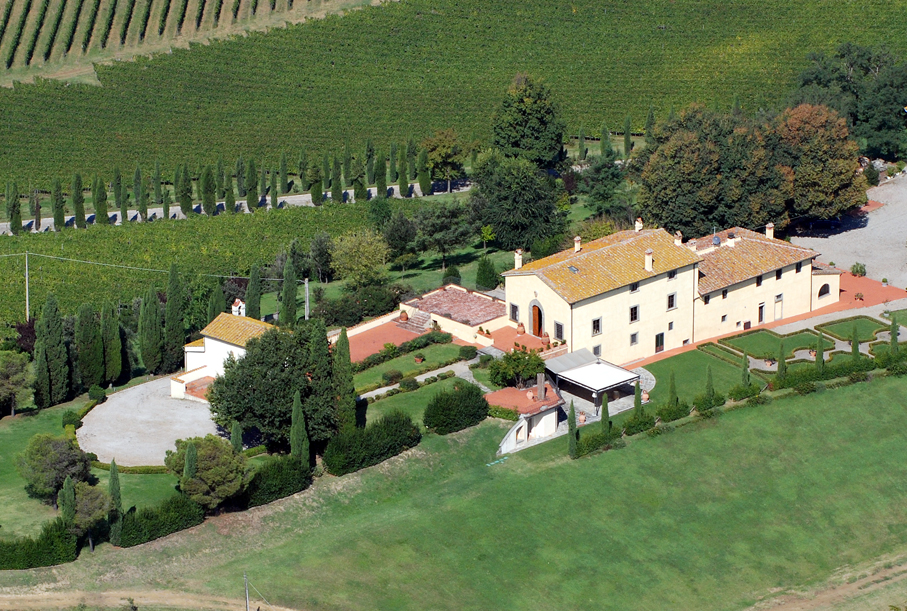 Foto aerea del Casale di Valle